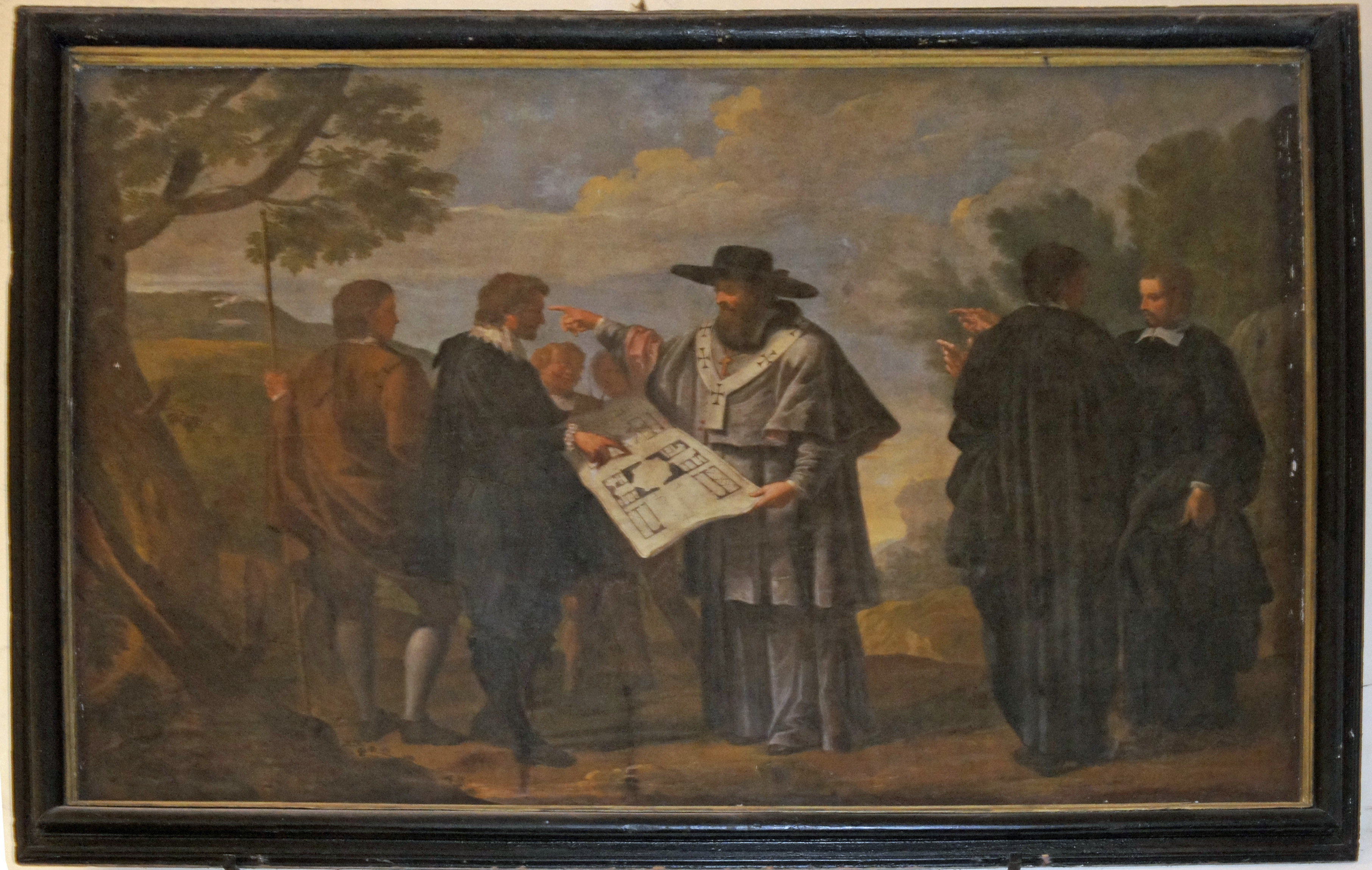 Nivard_de Reims choisit_l'emplacement de l'abbaye qu'il fonde .